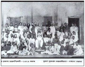 স্বামী নিগমানন্দ-ভক্ত সম্মিলনী ১৯২২ : (Swami Nigamananda in Bhakta Sammilani 1922): uploaded by Nilanchalswara